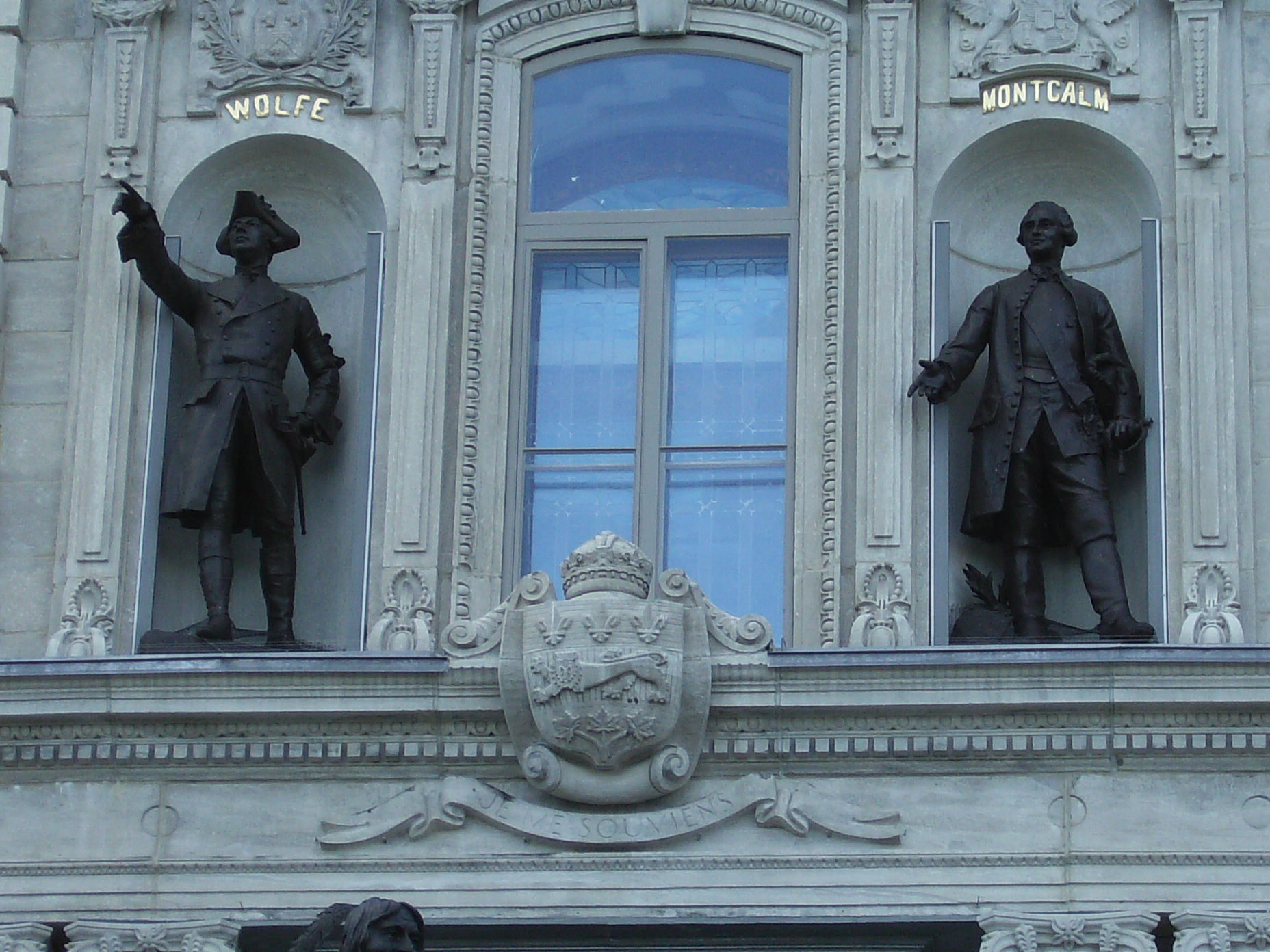 monuments à wolfe et montcalm-parlement du quebec